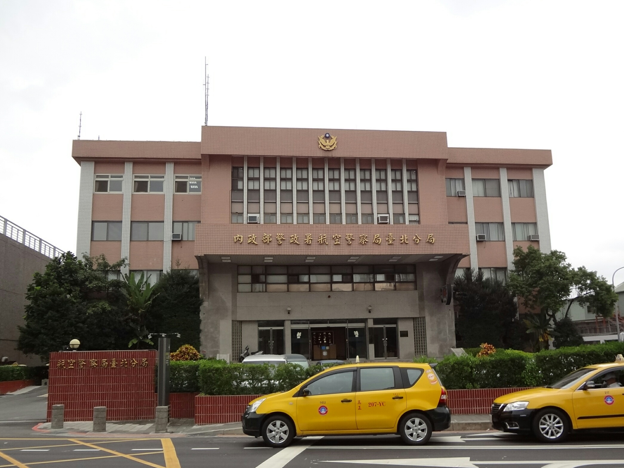 中華民國內政部警政署航空警察局臺北分局，地址：臺北市松山區敦化北路409號。